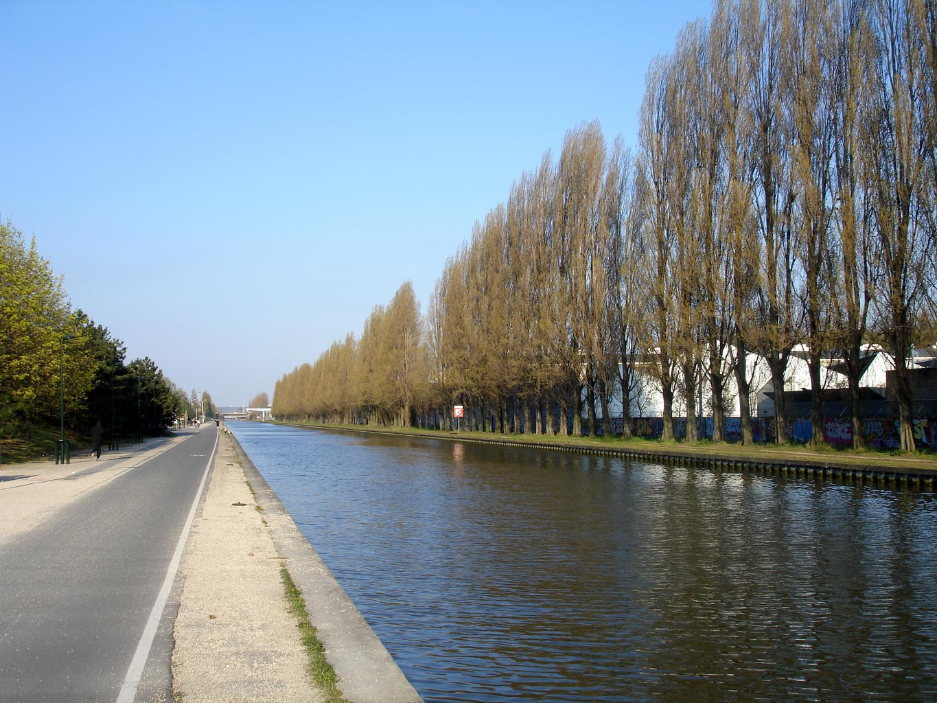 Canal de l'Ourcq au parc de la Bergère à Bobigny (Seine-Saint-Denis), France